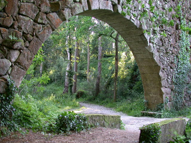 Rio Orxás no Frendoal, con ponte e acueducto para regar os campos